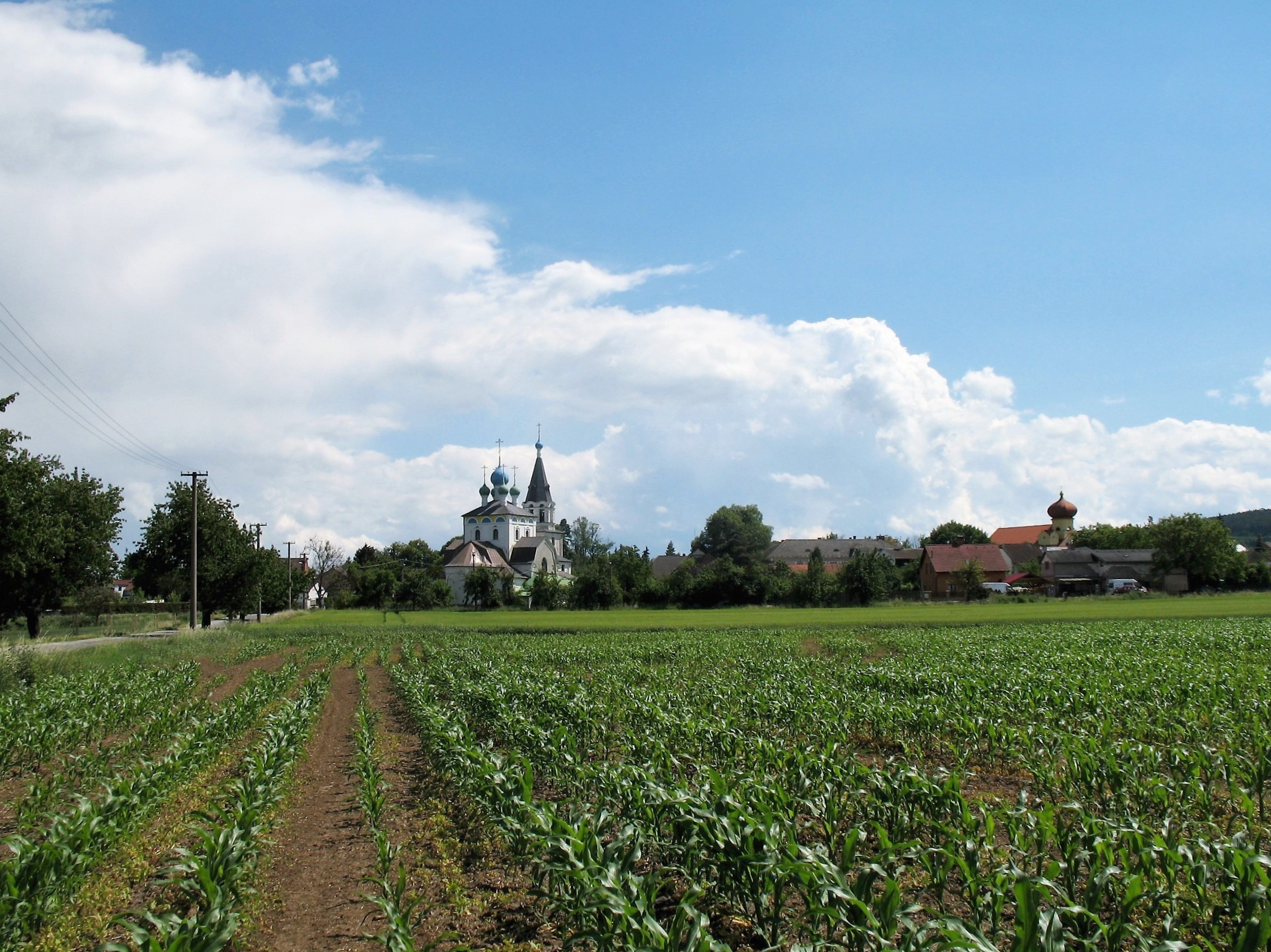 Chudobín u Litovle, okres Olomouc